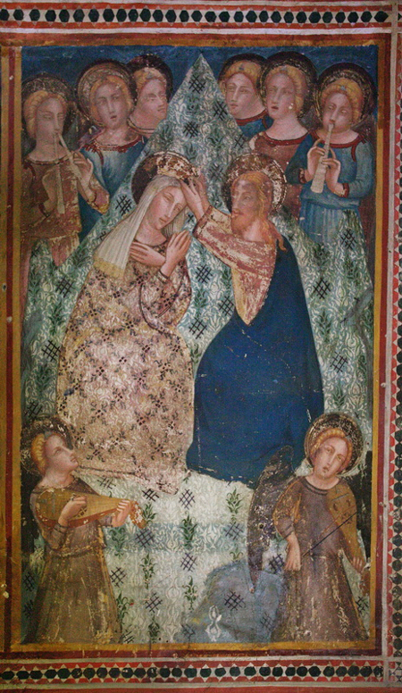 Жауме Феррер Басса. Коронация Девы Марии. 1346. Монастырь Педральбес (Барселона).